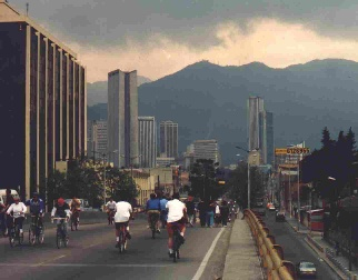 Ciclovía in Bogotá